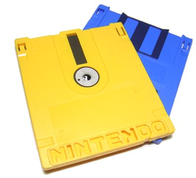 ファミリーコンピュータディスクカード、黄ディスク・青ディスク。2004年6月9日、利用者:Gleamによる撮影。